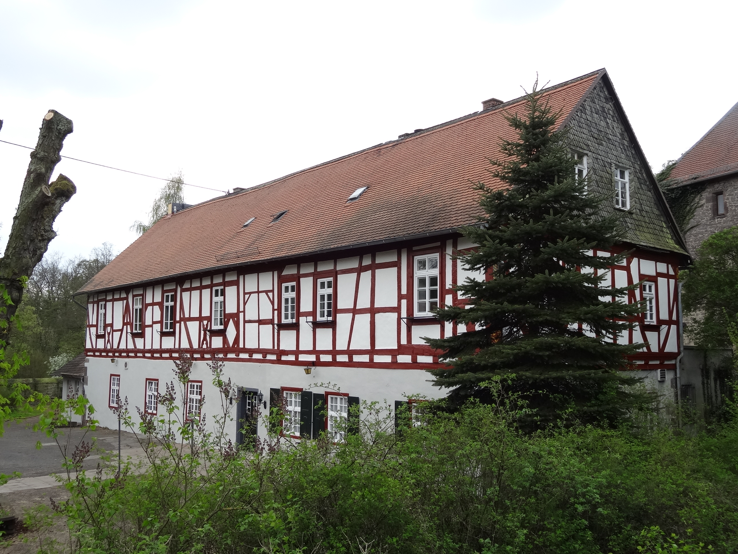 Kloster Arnsburg (Gasthaus)